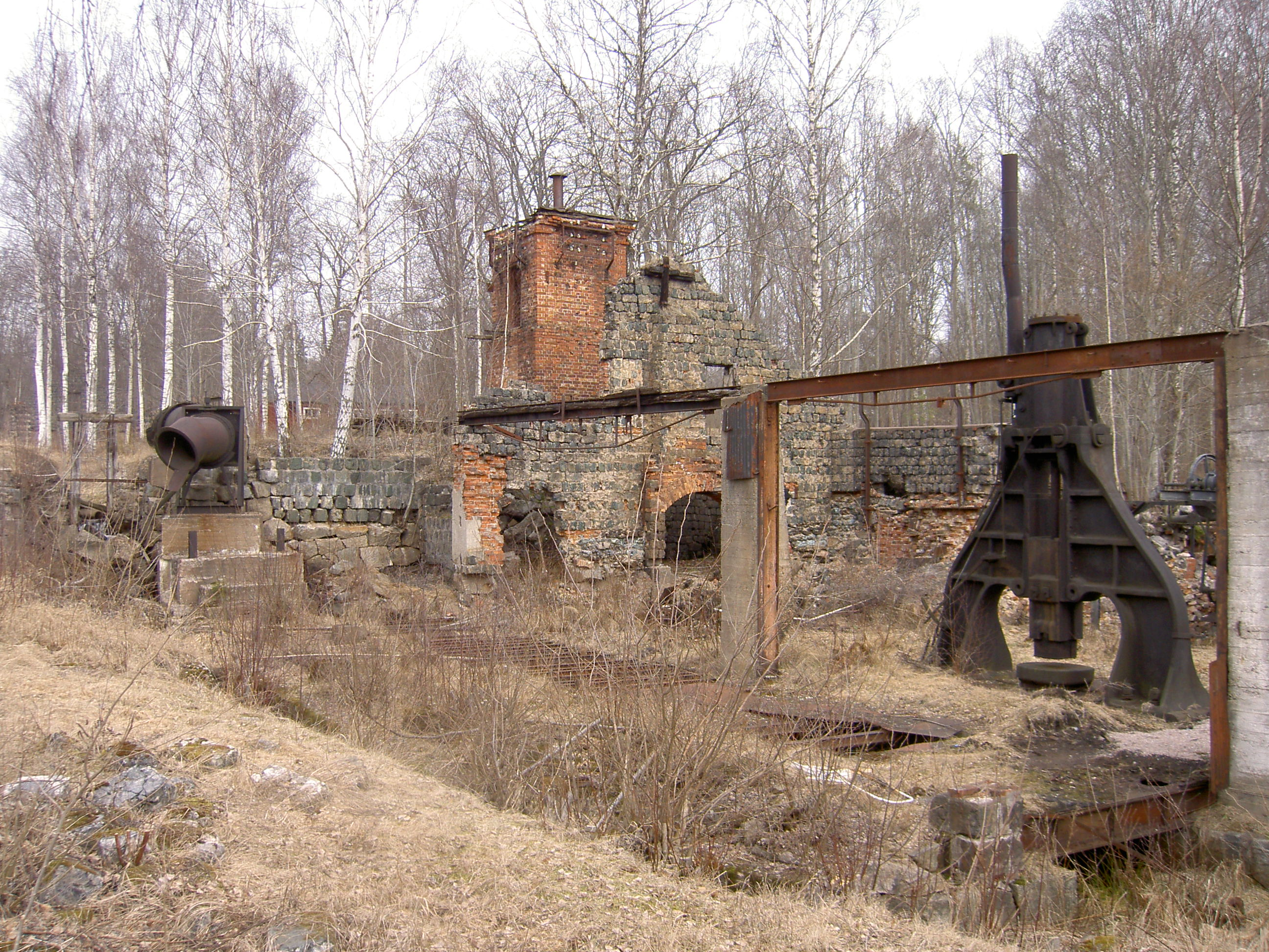 Den gamla hammaren/Old hammer, Horndals bruk, Sverige/Sweden